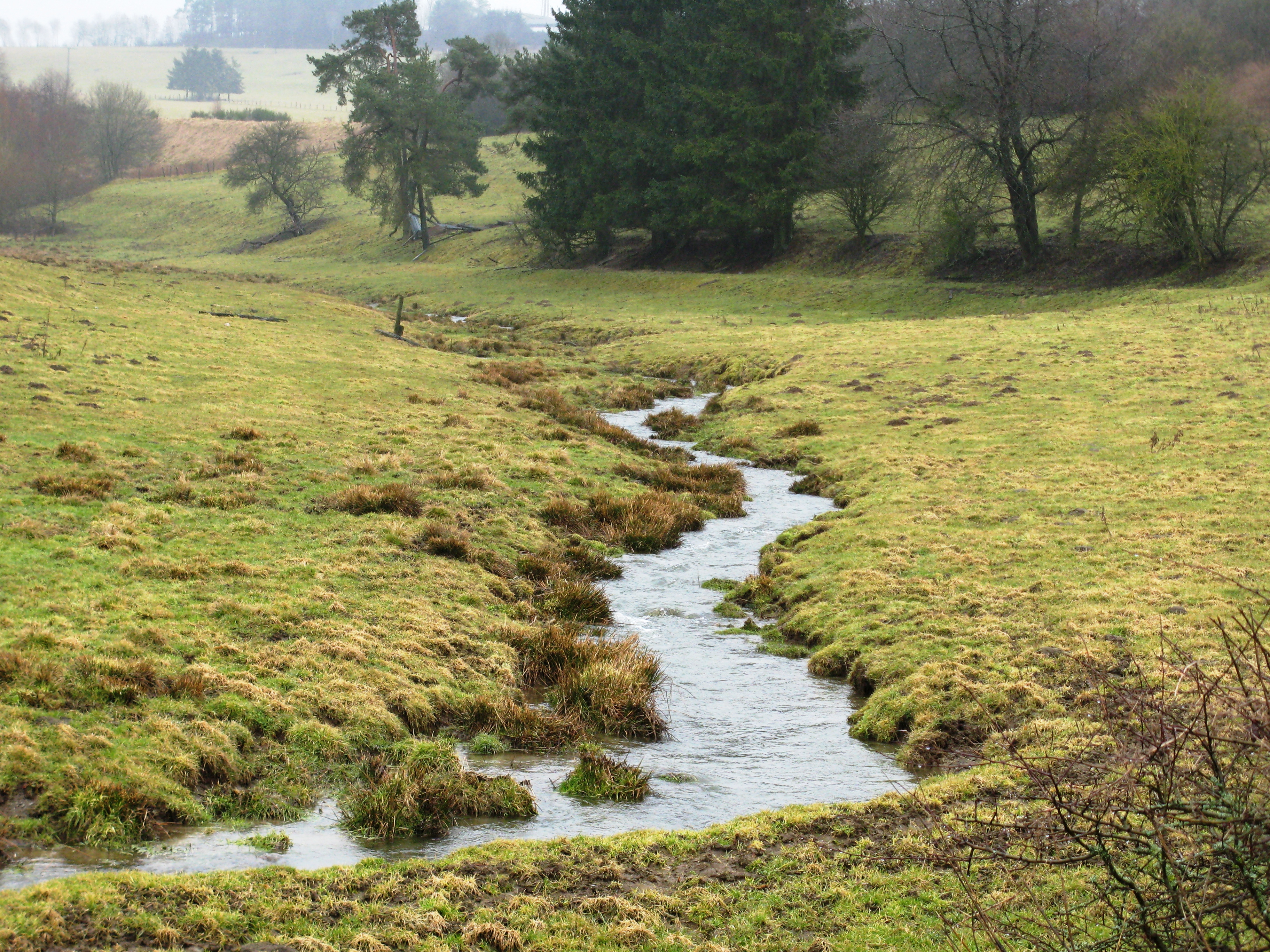 D'Stauwelsbaach vum CR 337 flossop gesinn. Kategorie:Baachen zu Lëtzebuerg